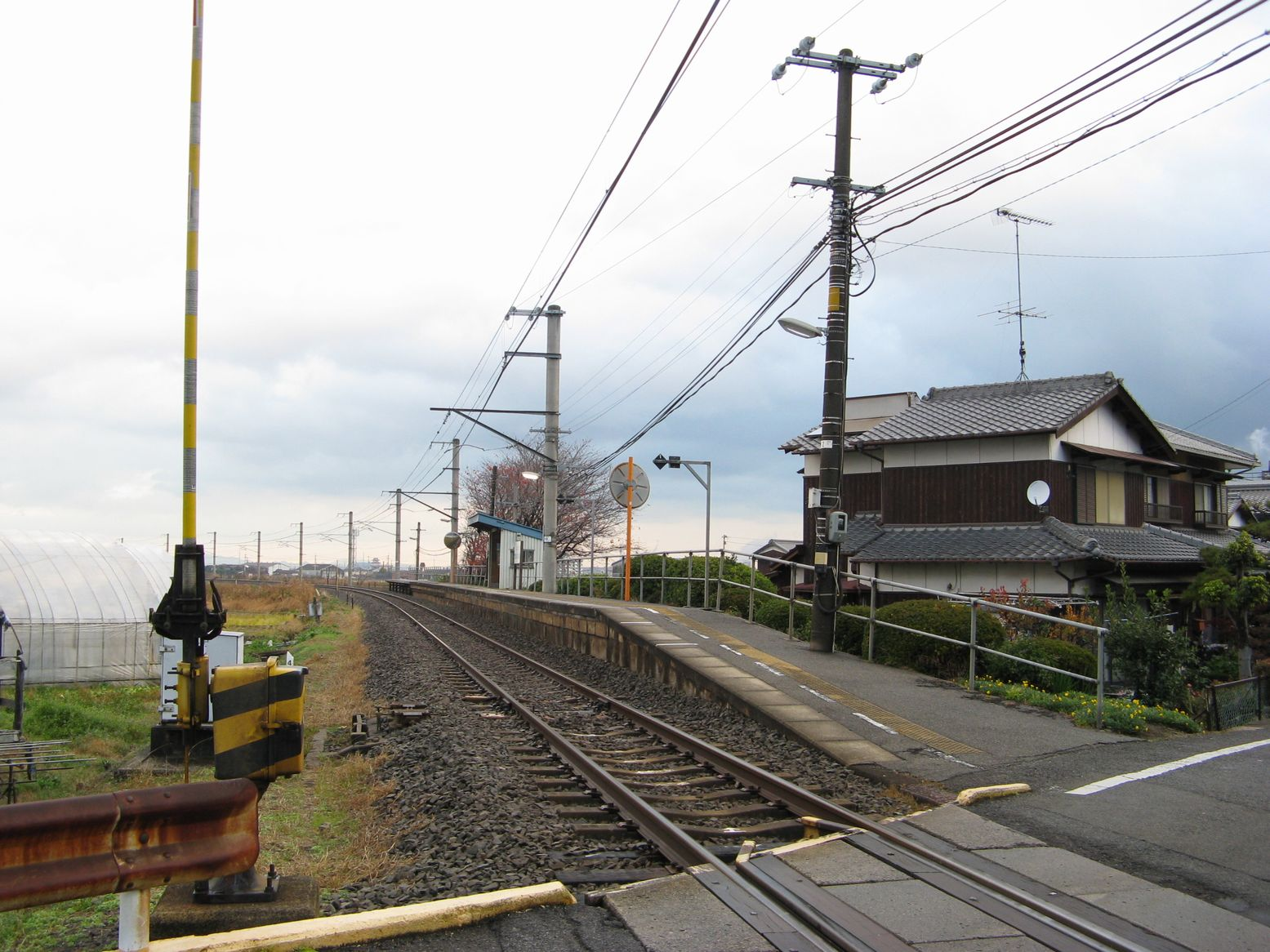 予讃線玉之江駅ホーム 玉之江踏切から北望 2008年12月15日 Bakkai撮影